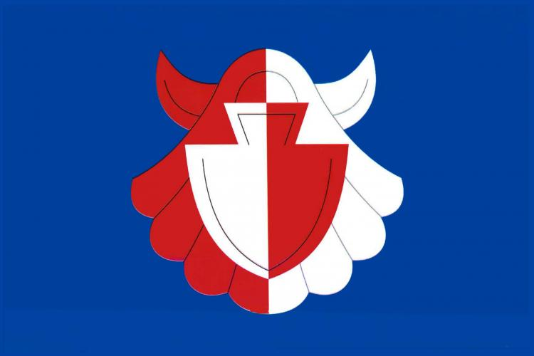 vlajka, Oráčov, okres Rakovník